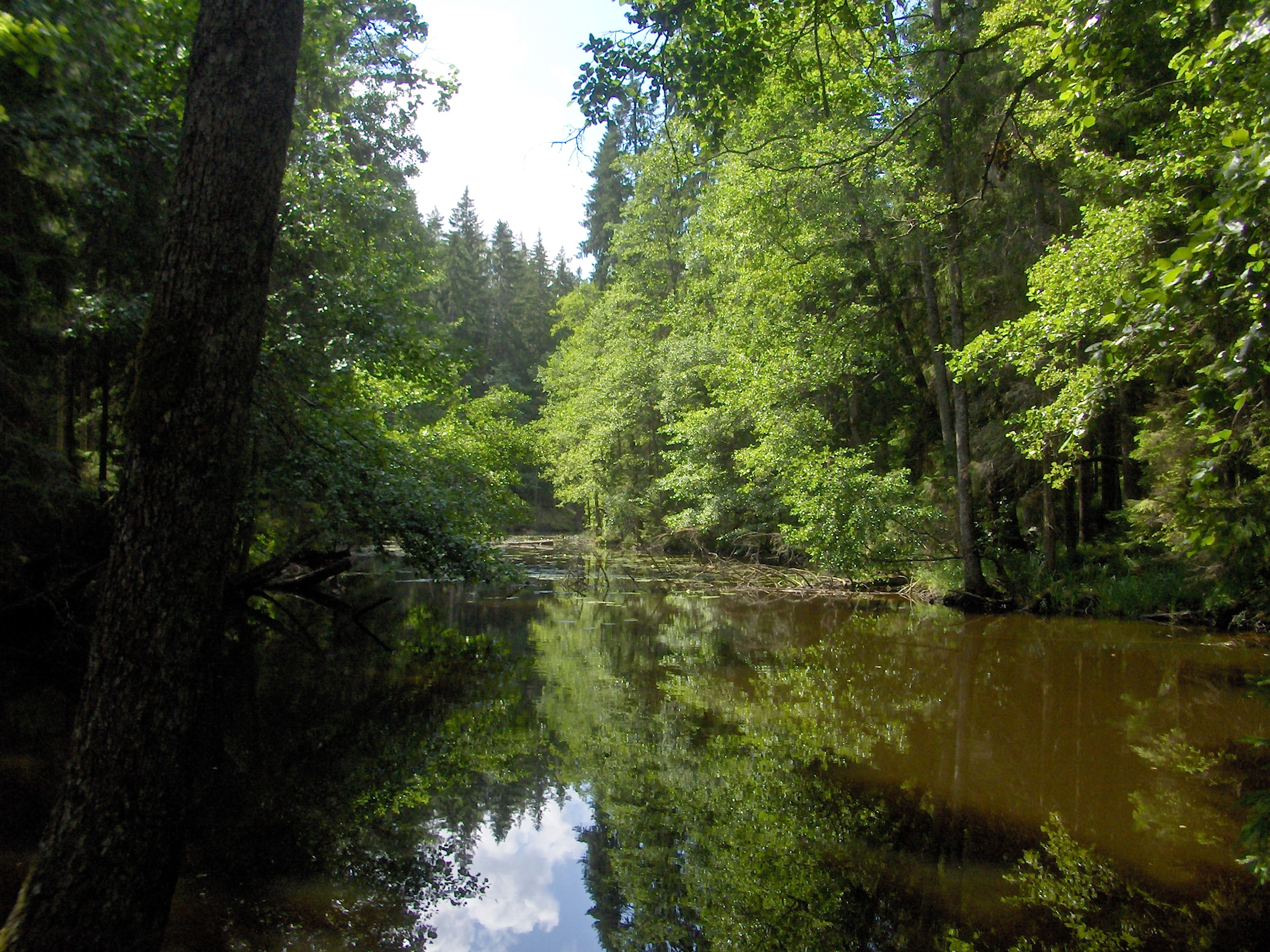 Kāņupe pie Mordangas ezera